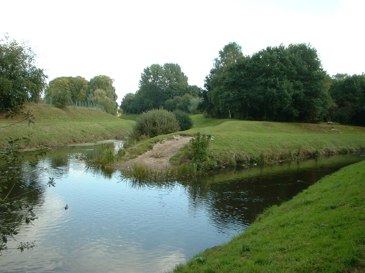 Zusammenfluss der Vechtearme in Nordhorn Česky: Soutok dvou ramen reky Vechte v Nordhornu